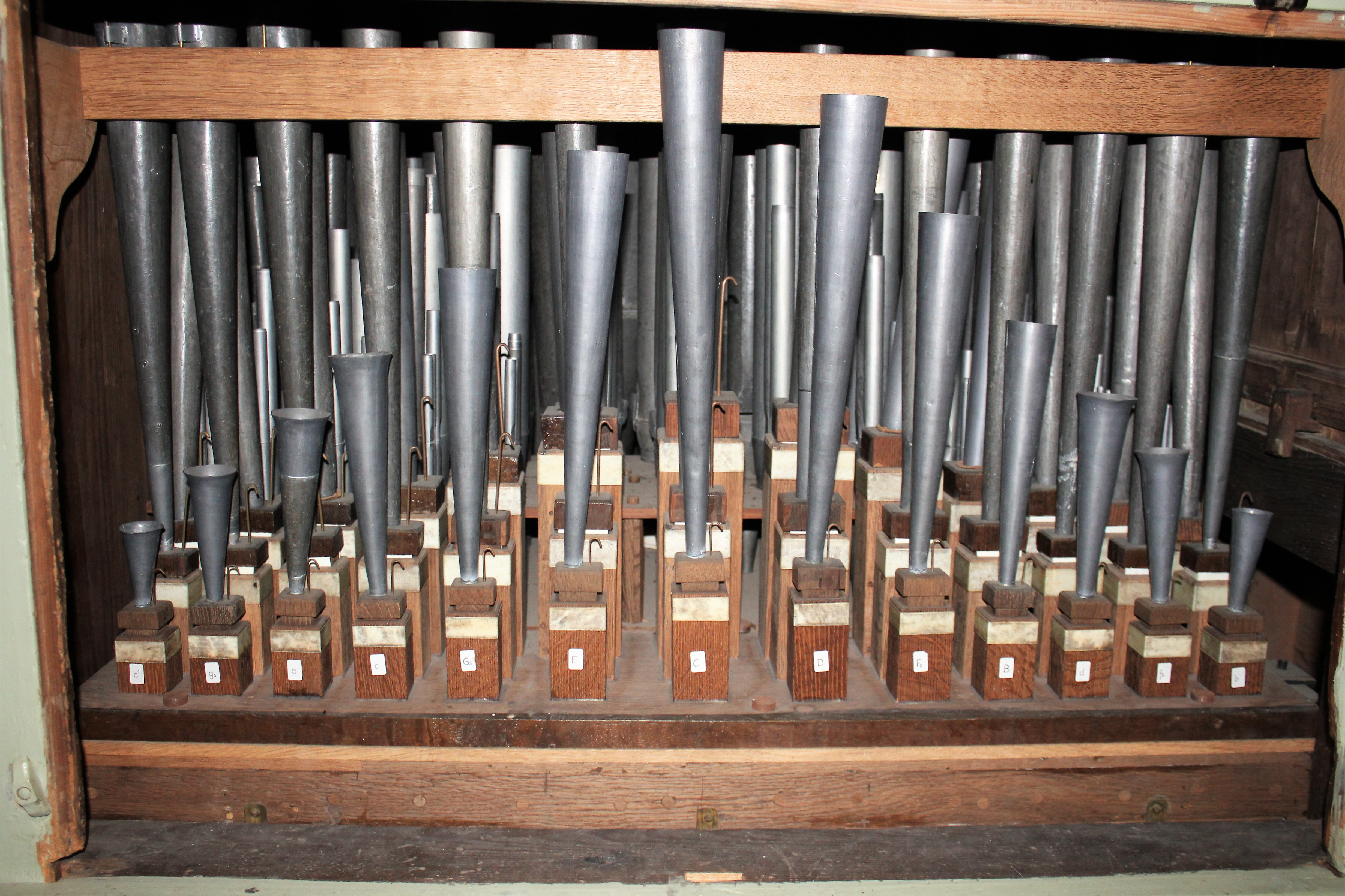 Orgel der St.-Jacobi-Kkirche Lüdingworth, Cuxhaven, Niedersachsen, Deutschland